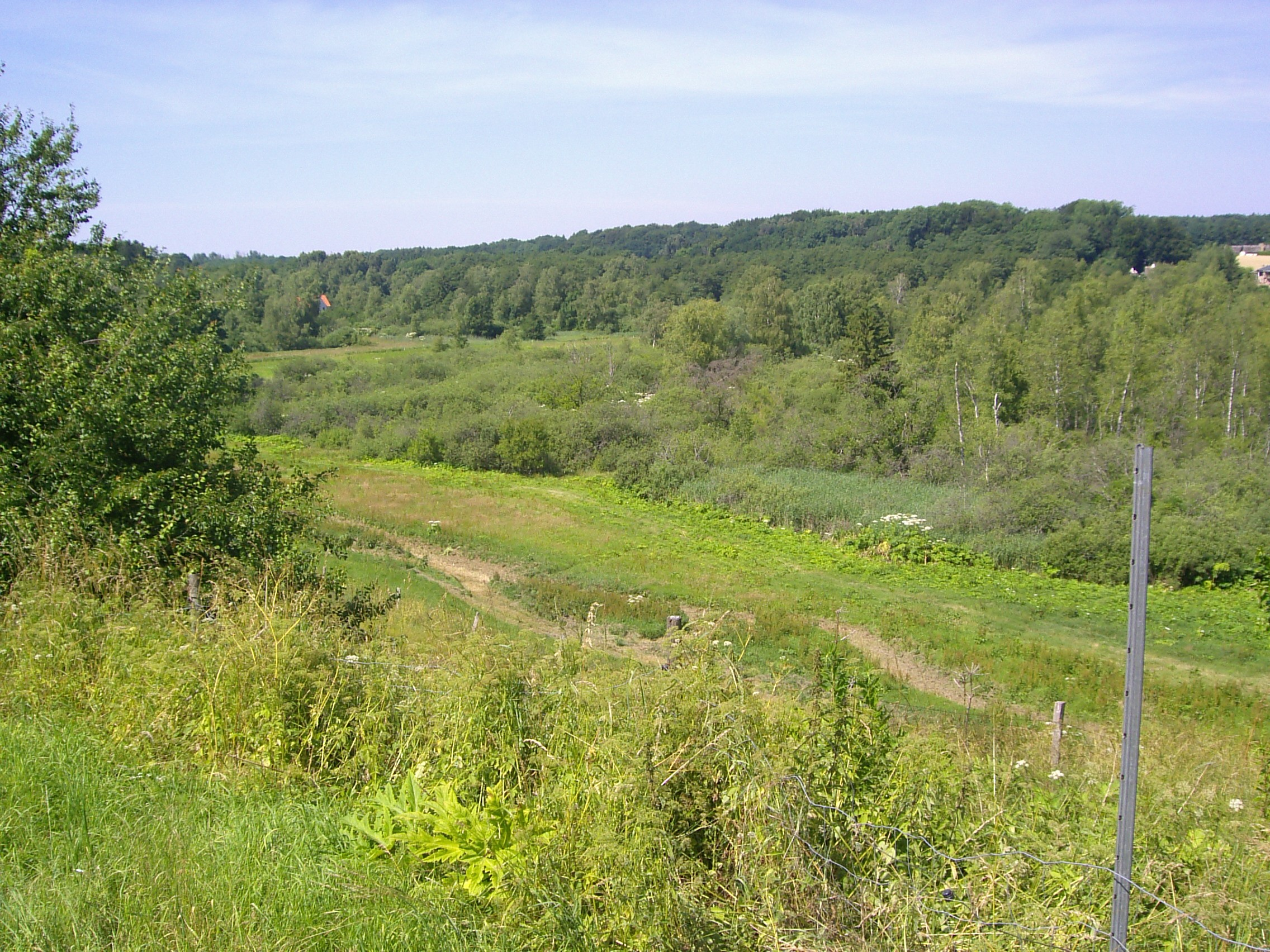 Farum Naturpark. Mølleådalen set i retning mod Slangerup. Flodleje fra sidste istid.